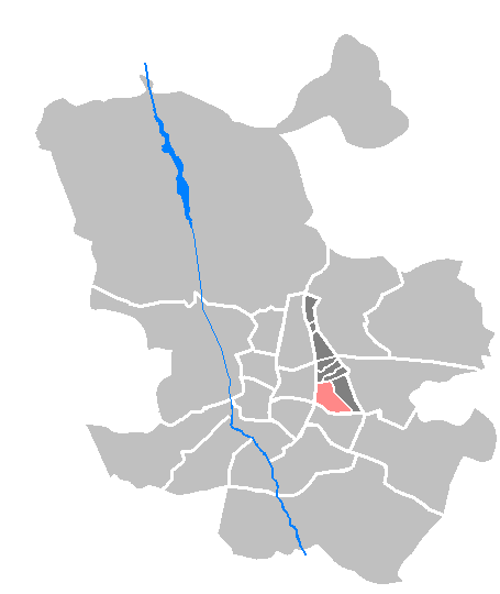 Map of Ventas within Ciudad Lineal and Madrid. Mapa de Ventas dentro de Ciudad Lineal, Madrid.